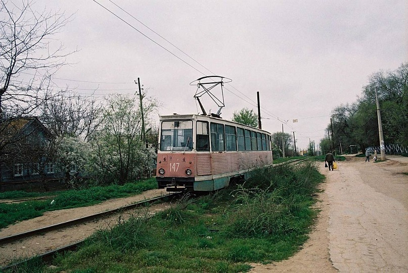 Астраханский трамвай